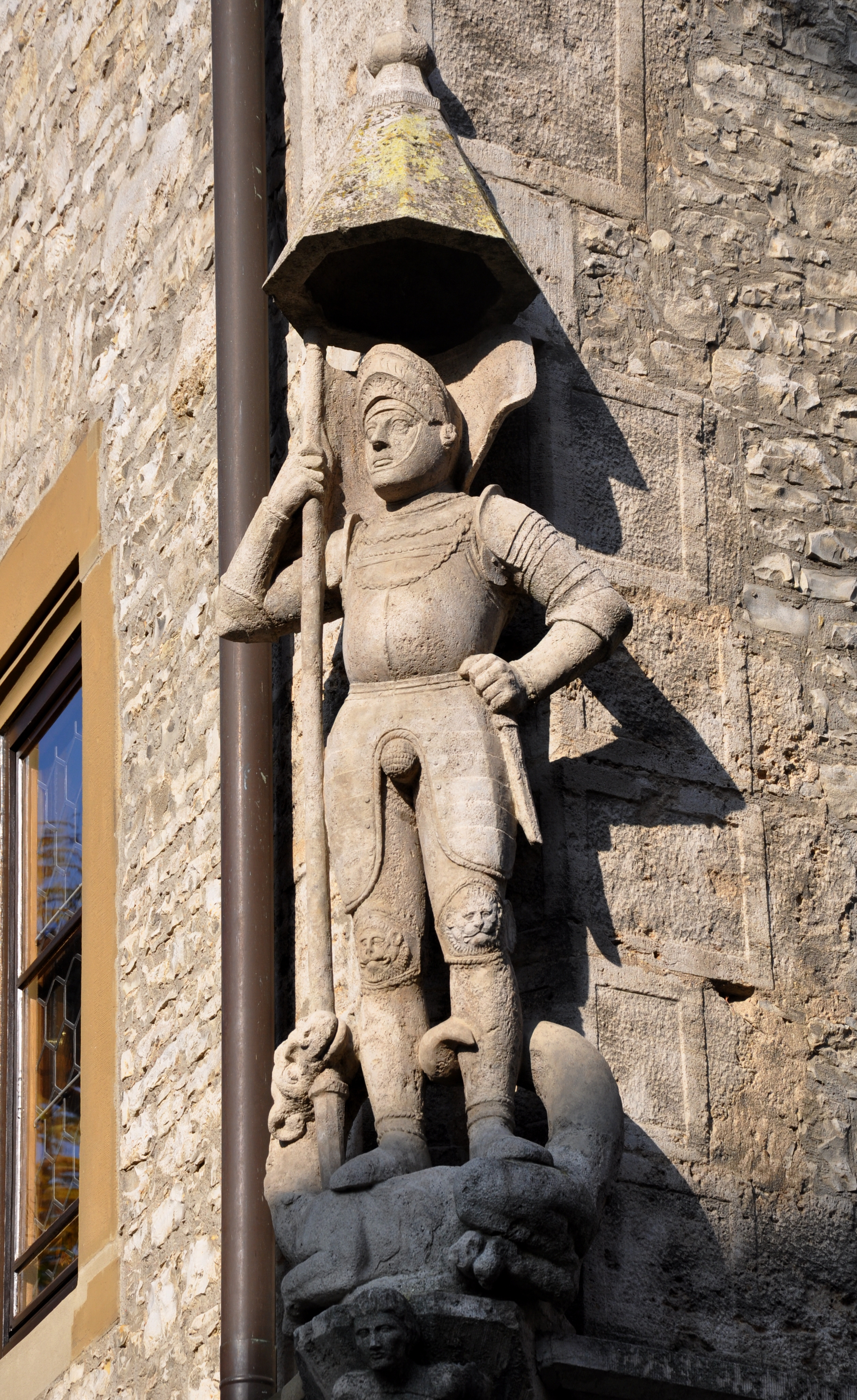 Marktbreit, Rathaus, Skulptur St. Georg